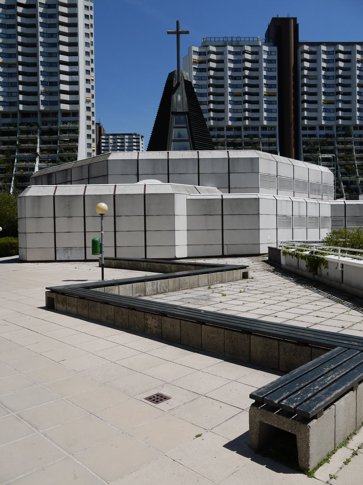 Wohnpark Alterlaa Kirchenplatz und Kirche